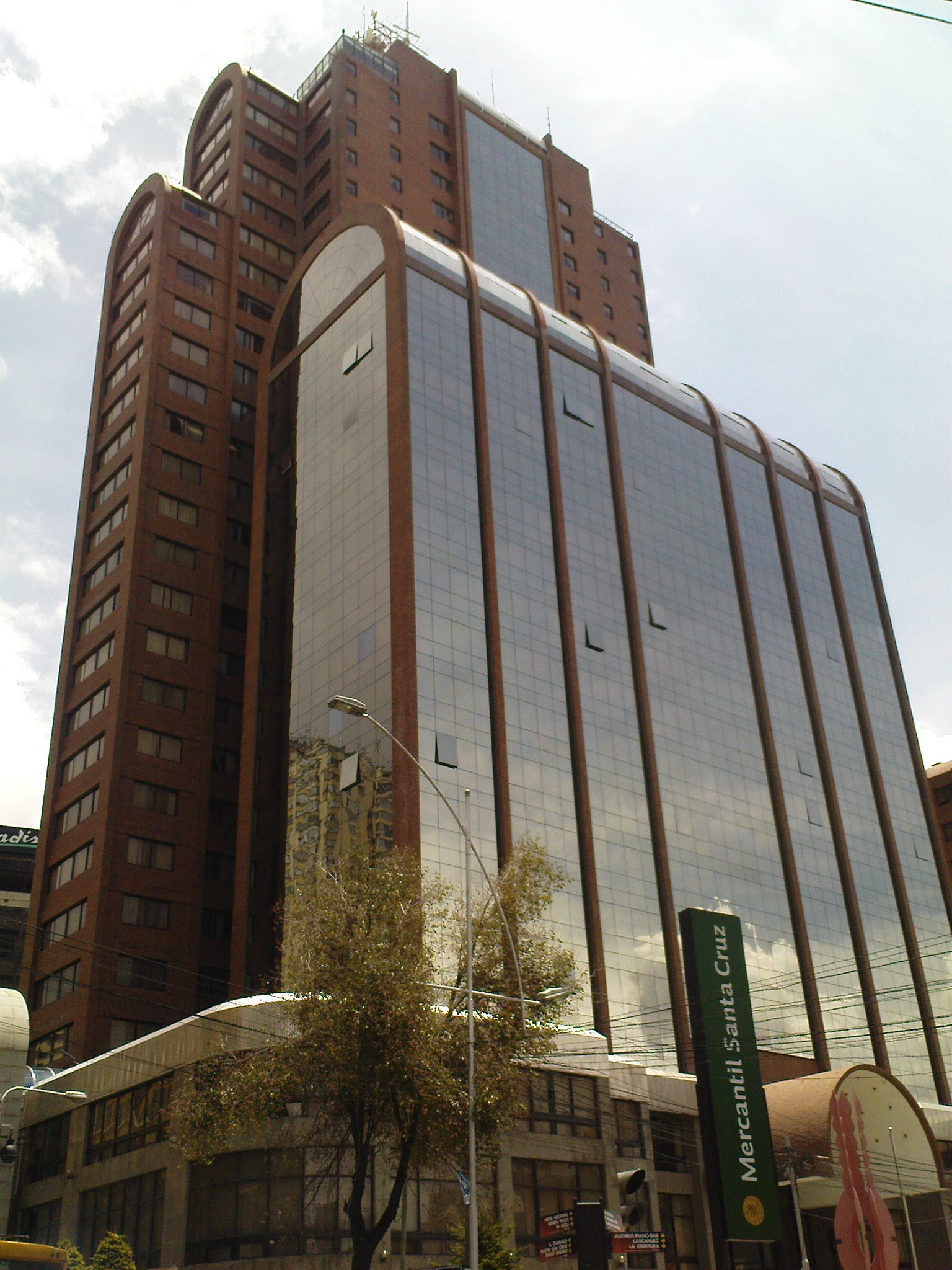 Edifico Multicentro en La Paz — fotografia tomada desde la Av. Arce.